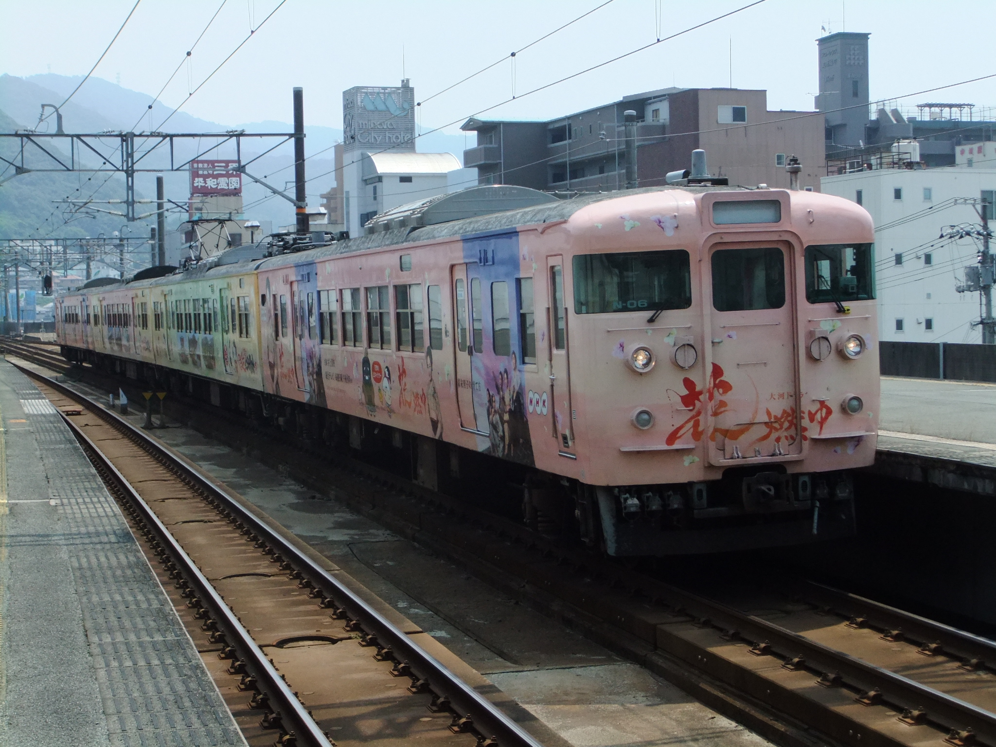 115系N-06編成「花燃ゆ」ラッピング車両。山陽本線、三原駅。